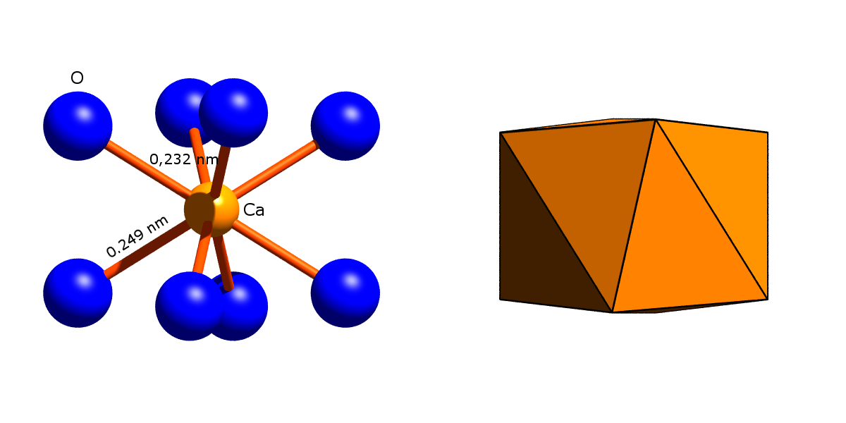 Granatstruktur: CaO8-Dodekaeder basierend auf Strukturdaten von synthetischen Grossular bei Raumtemperatur